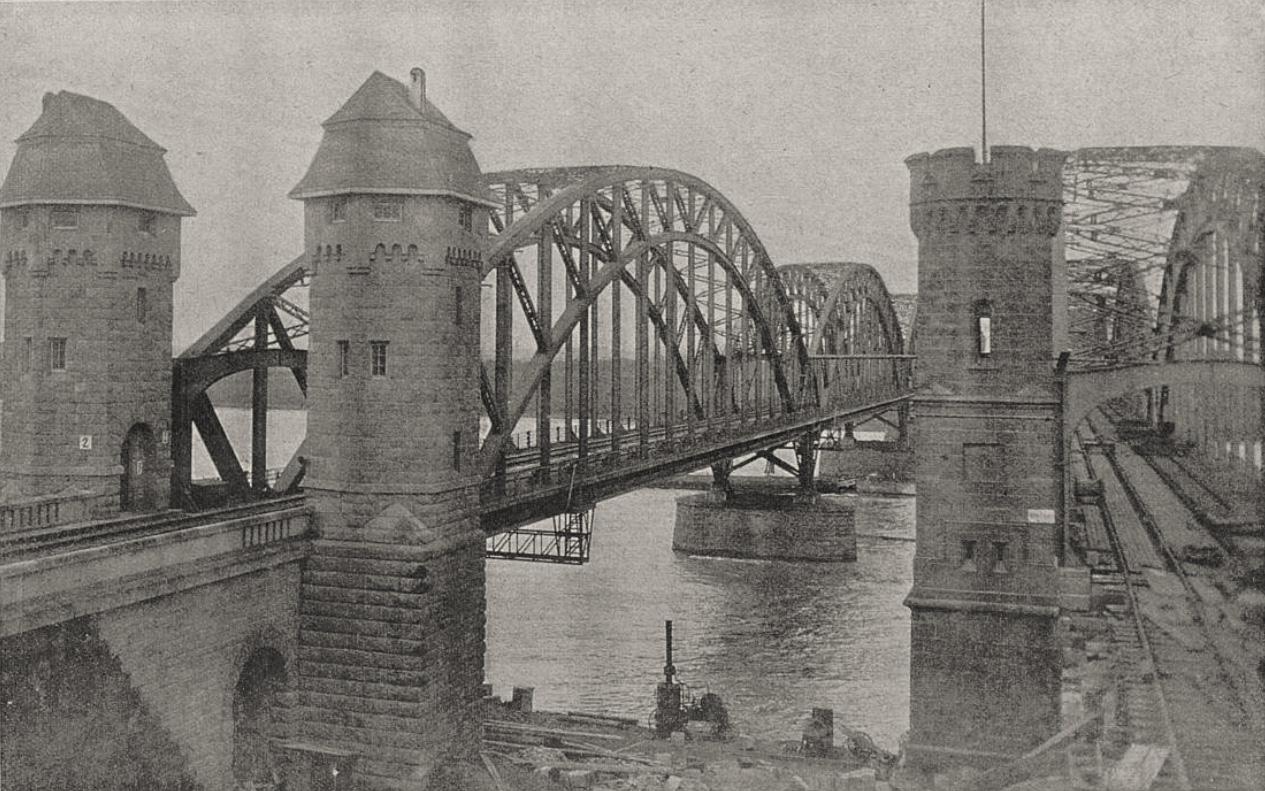 Die beiden Düsseldorfer Eisenbahnbrücken bei Hamm, links die neue in ihrer Vollendung, rechts die alte, 1868–70 erbaute, im Umbau. Foto Jean Esser, Düsseldorf, 1912